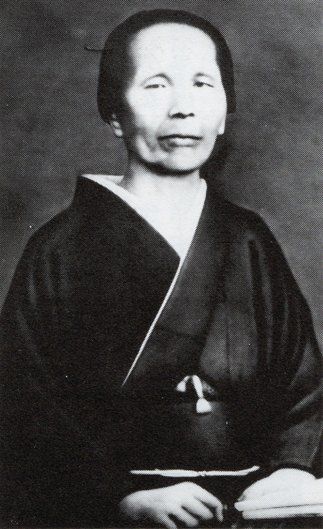 松尾多勢子の肖像写真。